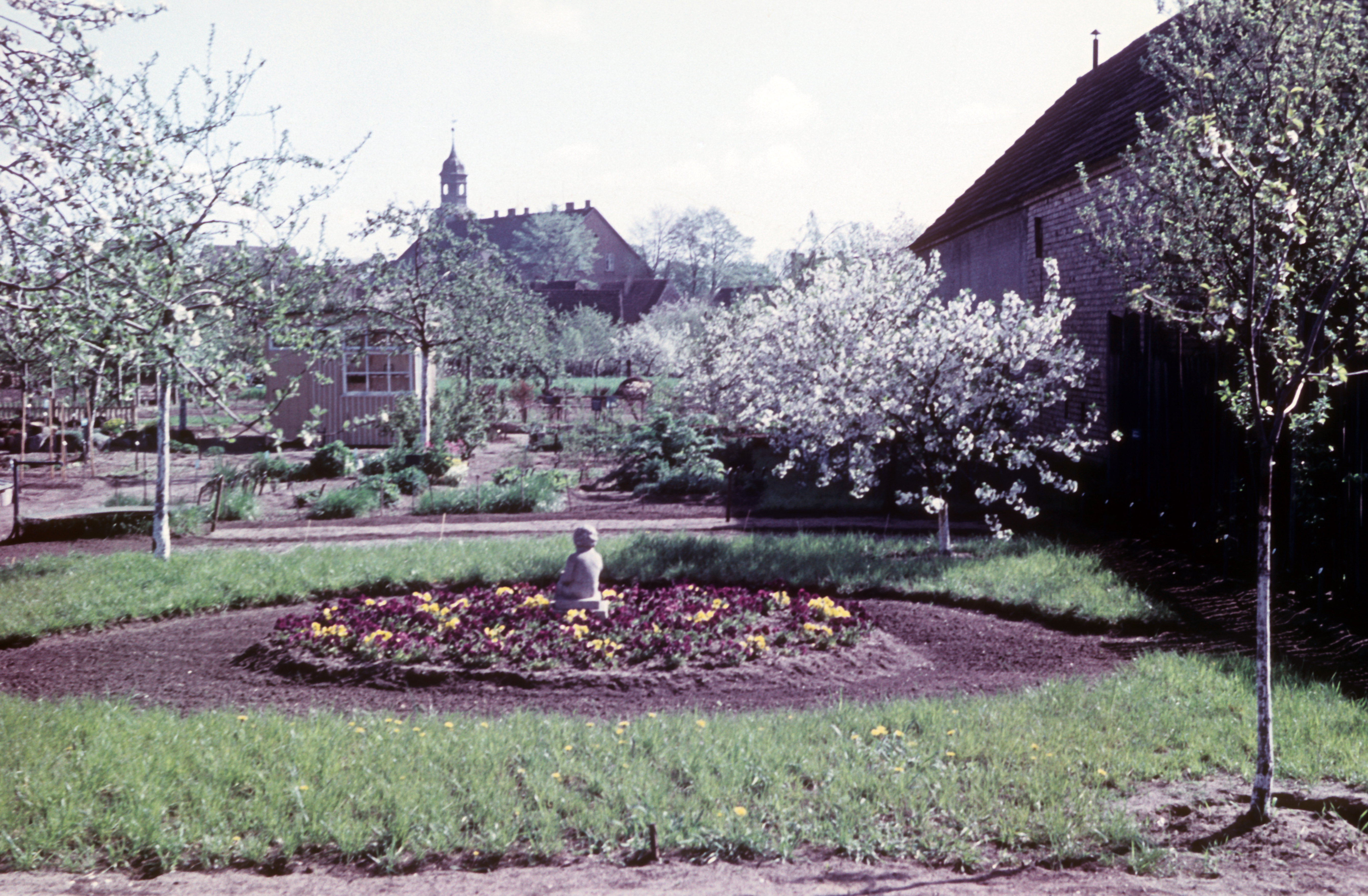 Ruhland, Hartwigstraße, Schulgarten, Teil-Westansicht (vor dem Blumen-Rondell Richtung Laube)